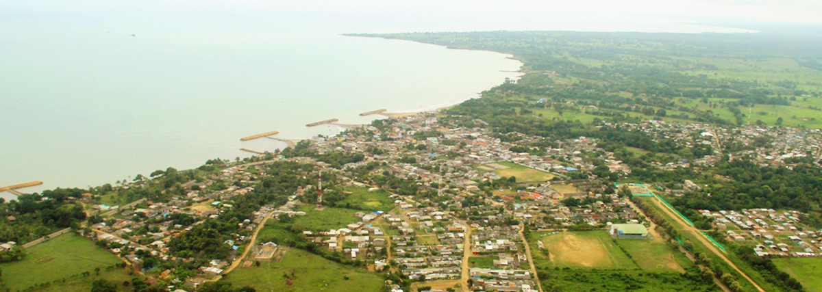 ciudad tropical arboletes en antioquia colombia